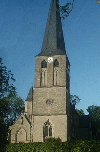 Kalkar , Germany, St. Regenfledis Kirche